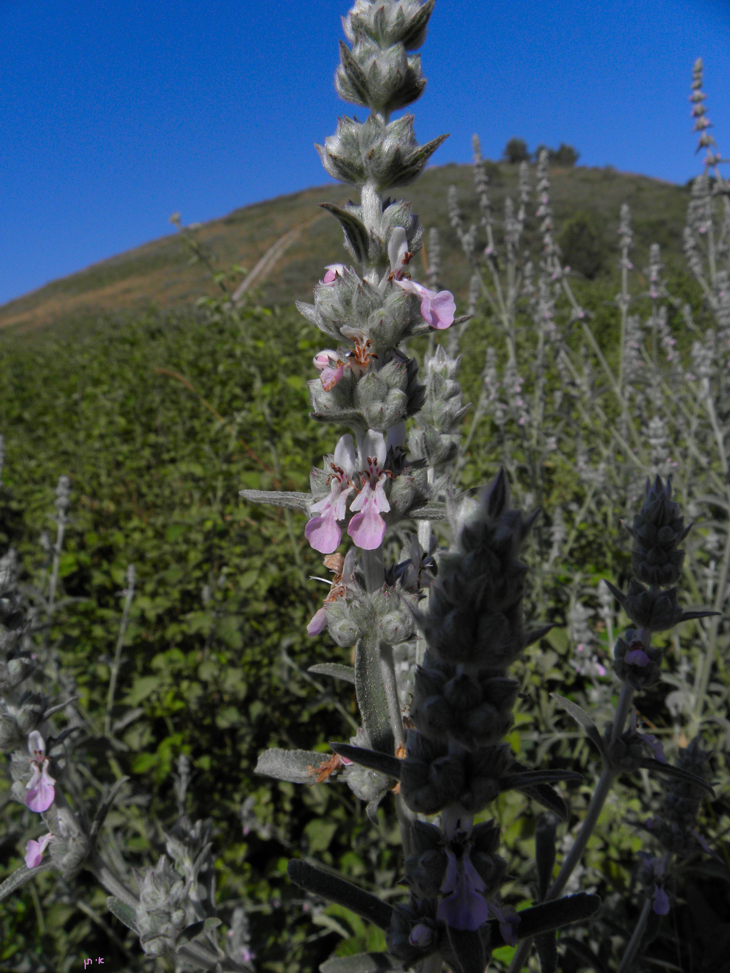 Stachys viticina אשבל הבִּצה - נחל השנָיִם